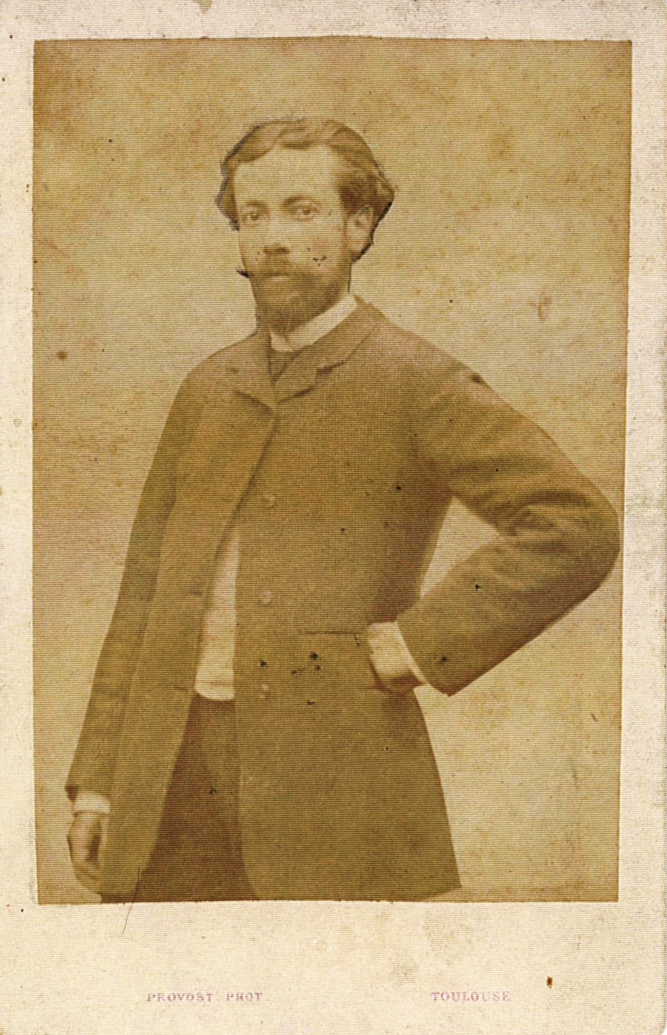 Photographie de Jean-Marie Lacrampe (1855-1917), architecte de la ville de Lourdes (Hautes-Pyrénées, France, en 1877